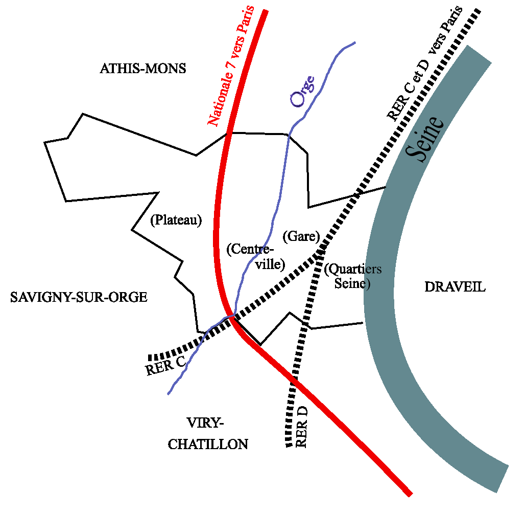 Ville de Juvisy, schématisée/Town of Juvisy-sur-Orge, France